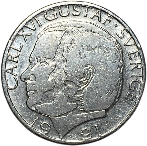 Vorderseite Münze 1 schwedische Krone 1991